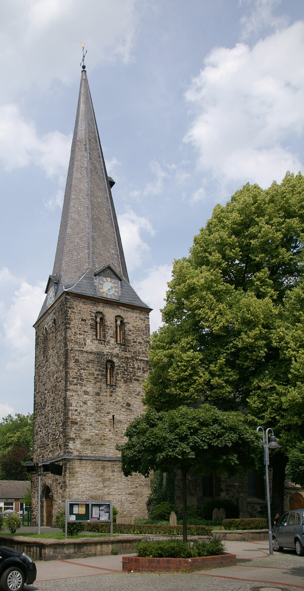 Turm der Christuskirche in Bochum-Langendreer. Um 800 Kapelle, um 1250 Bau des Turms, 1742 Neubau des Kirchenschiffs, 1886 Anbau des Chorraums. Glocken: 1491 "Maria", 1515 "Johannes", 1537 "Urbanus". Daten laut Tafel an der Kirche.